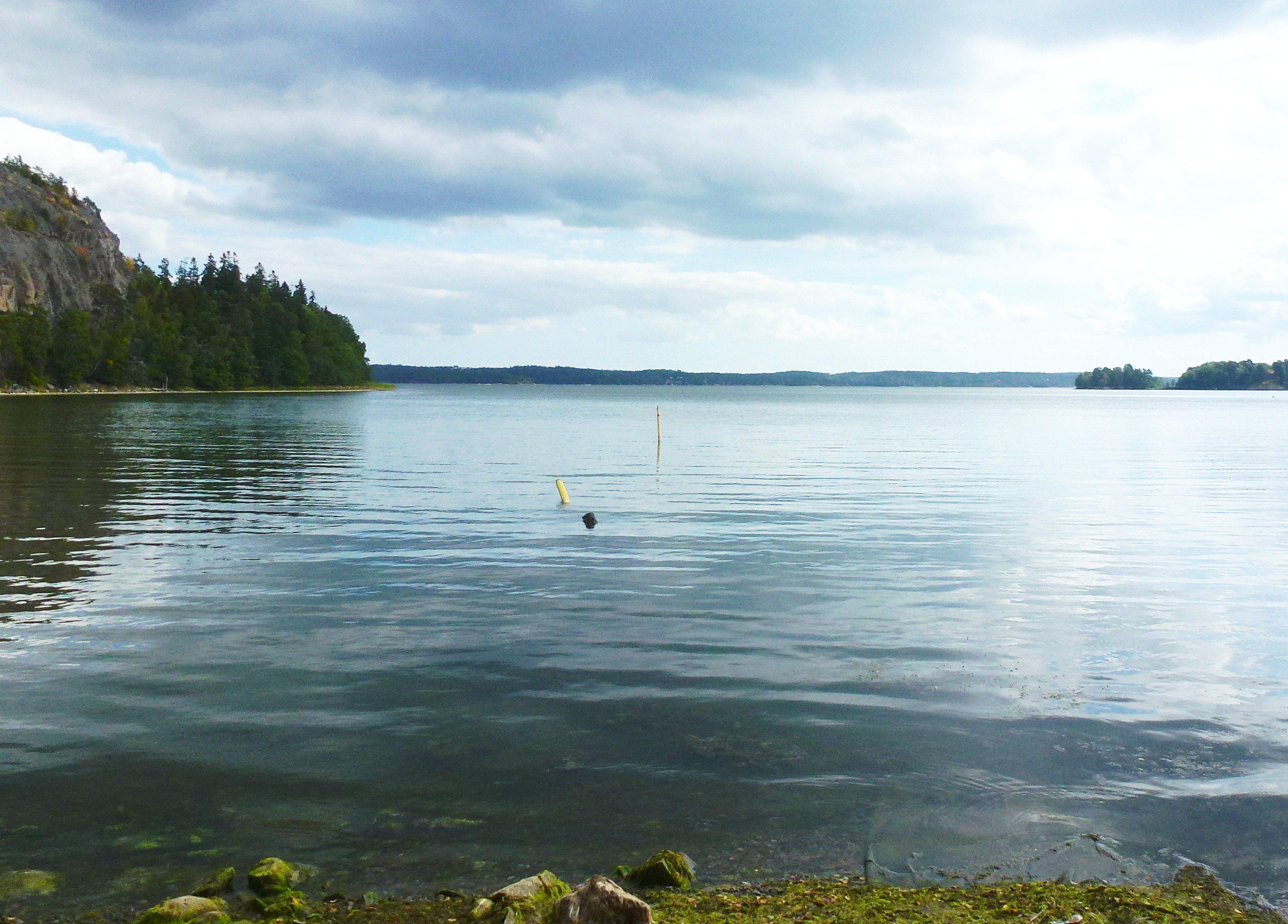 Baggensfjärden vy från Kilsviken med Ekoberget till vänster